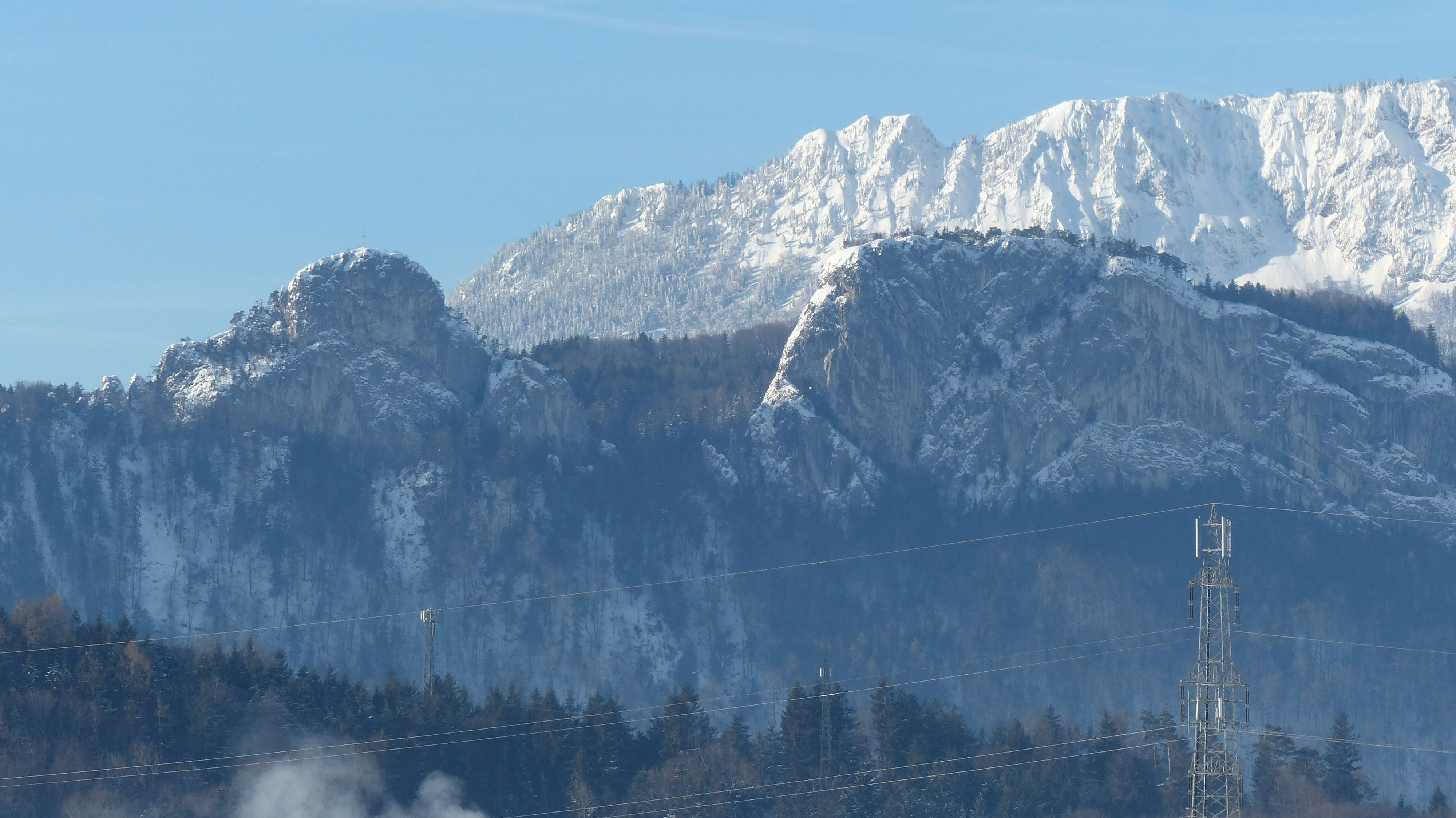 Winterblick Salzachtal Barmsteine mit südlichen Ausläufern des Untersbergs